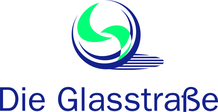 Markenzeichen der Glasstraße